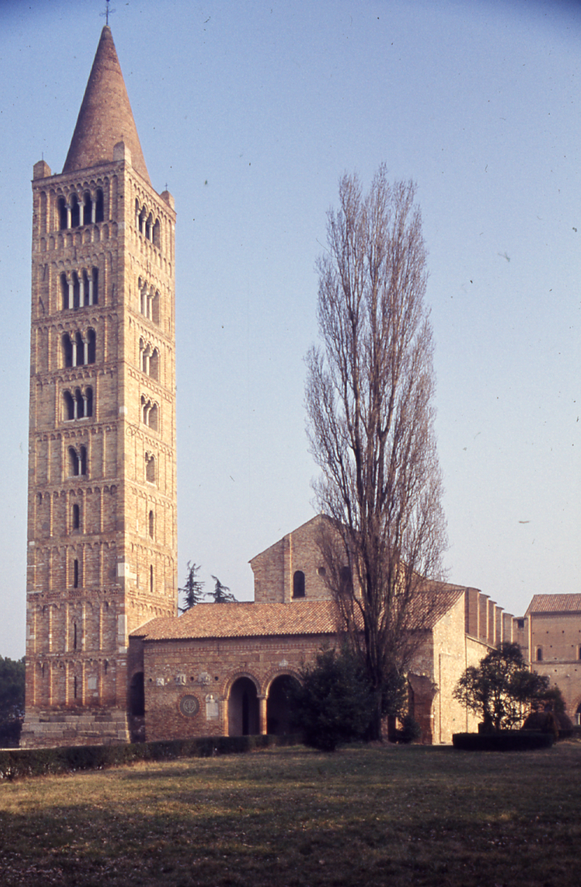 negative circa relative alla campagna fotografica eseguita nel periodo dicembre '74-febbraio '75 [...] - Mesola, Valli di Comacchio, Verginese, Belriguardo, Copparo, Pomposa, Chiaviche, Bonifiche, La Stellata, Cento etc. - Fonte: Monografia: Territorio ferrarese: un programma di governo della Regione e delle autonomie locali, catalogo della mostra, Ferrara 1975, a cura di Roberto Fregna, Modena, Soc. Immobiliare & Poligrafica emiliana (1975). - Fonte: Fattura di Paolo Monti: IV. Commesse/ Fattura n. 16/ Diapositive per audiovisivo Regione Emilia-Romagna (1973/10/22), presso Archivio Paolo Monti. N. 1000 diapositive a colori formato 35mm sugli aspetti del patrimonio naturale, artistico e culturale della Regione. Dal territorio di Parma e Piacenza, fino a Ravenna e oltre [...] compreso il ferrarese [...]